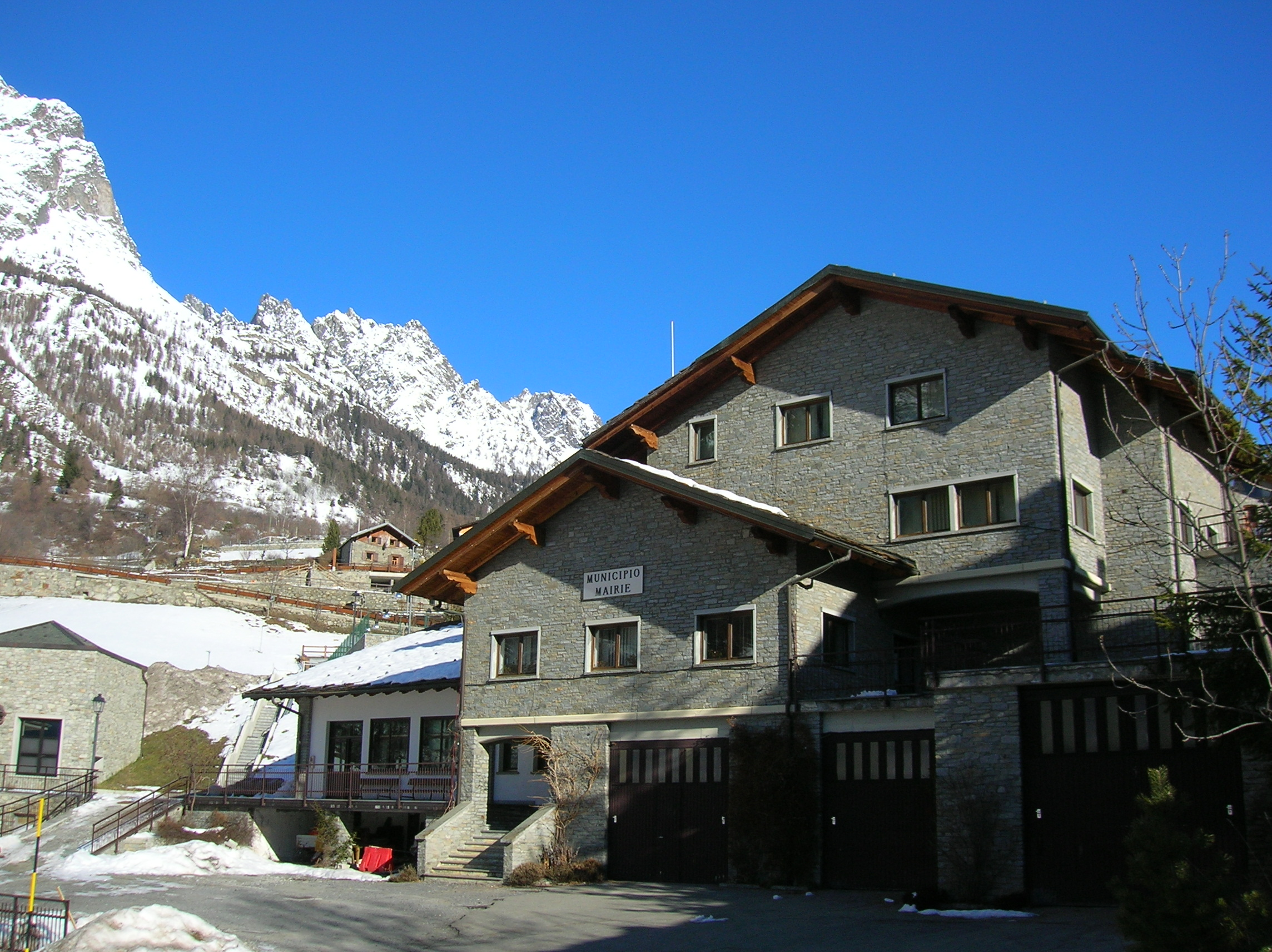 Municipio di Oyace, Valle d'Aosta, Italia.